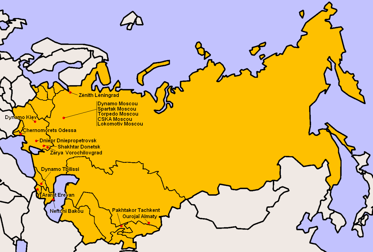 Clubs participants à la Division Supérieure 1978.